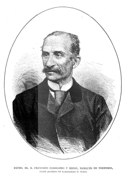 Retrato de Francisco Caballero y Rozas, recogido en la revista española La Ilustración Española y Americana.